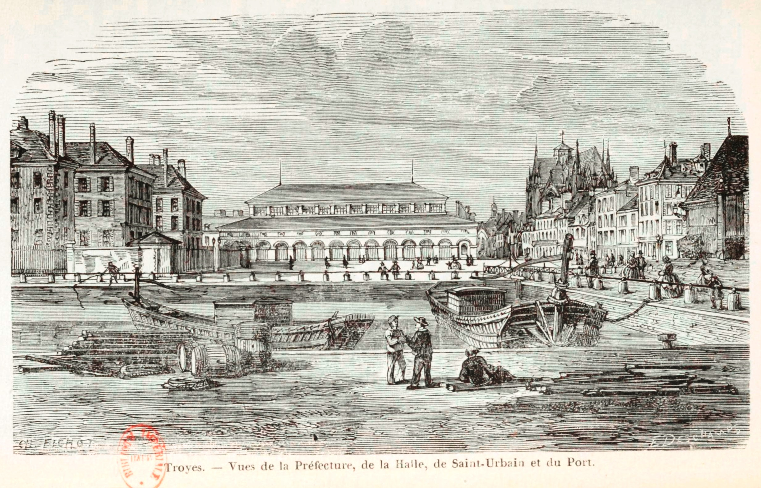 Préfecture, Halle aux Blés, Saint-Urbain et Port (Gravure de Ch. Fichot, dans "Troyes et ses environs", A. Aufauvre, 1860).